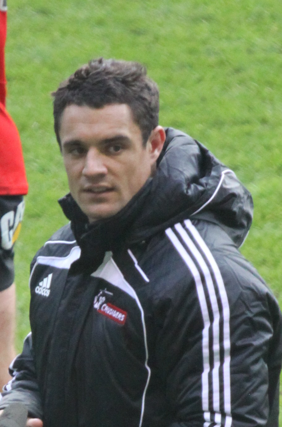 Dan Carter à Twickenham avec les Crusaders.